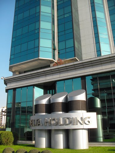 Poslovna zgrada Delta holdinga u ulici Milentija Popovića 7. Snimak novembar 2009.